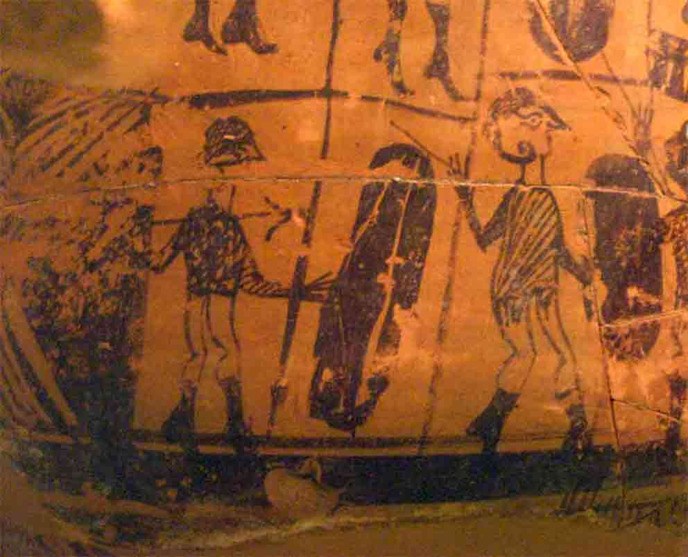 Detall de guerrers ballant. Ceràmica trobada al Castell del Castellar a Oliva. Museu arqueologic de Catalunya.